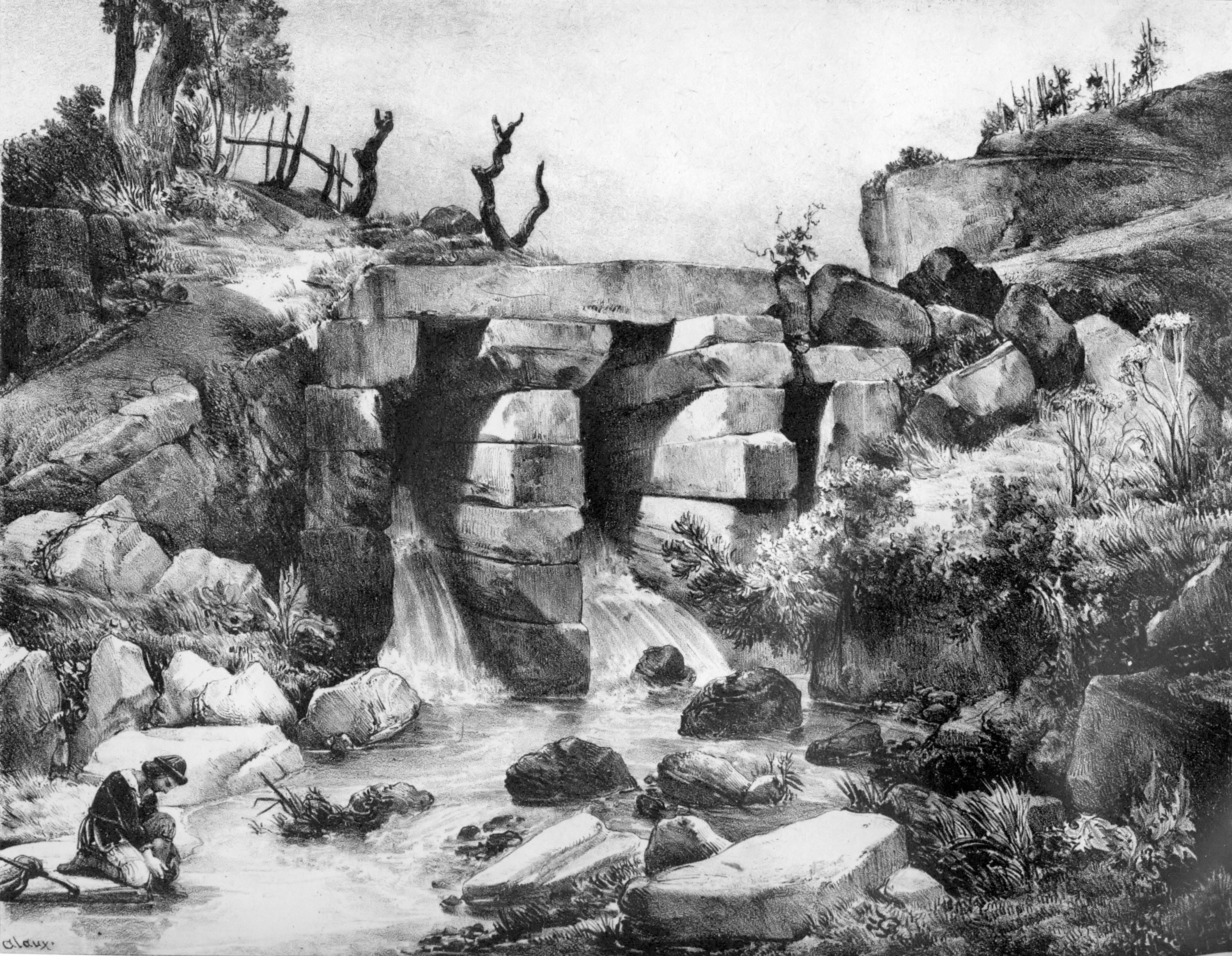 Pont des Arches à Villards d'Heria (Jura)